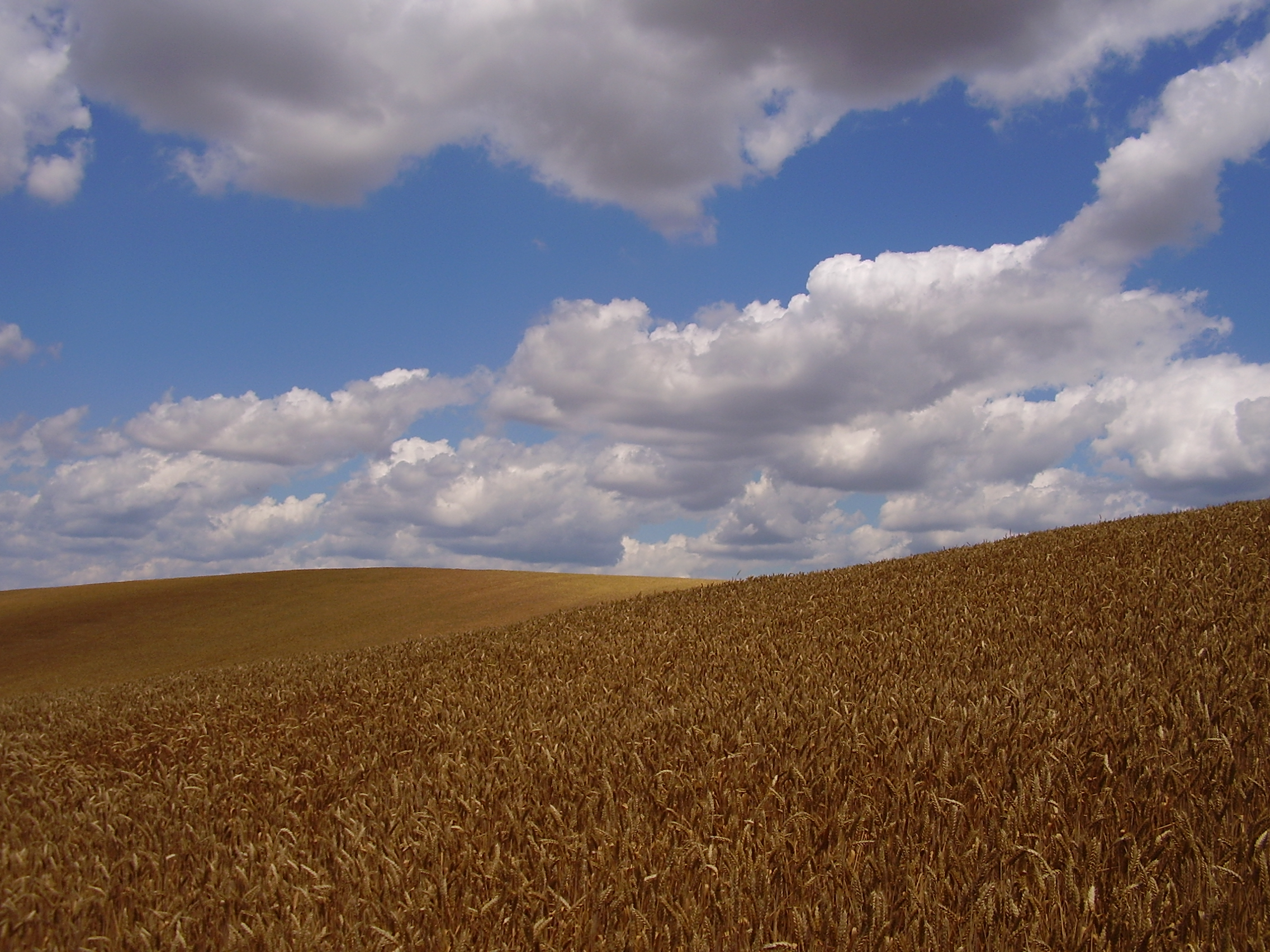 Obilie